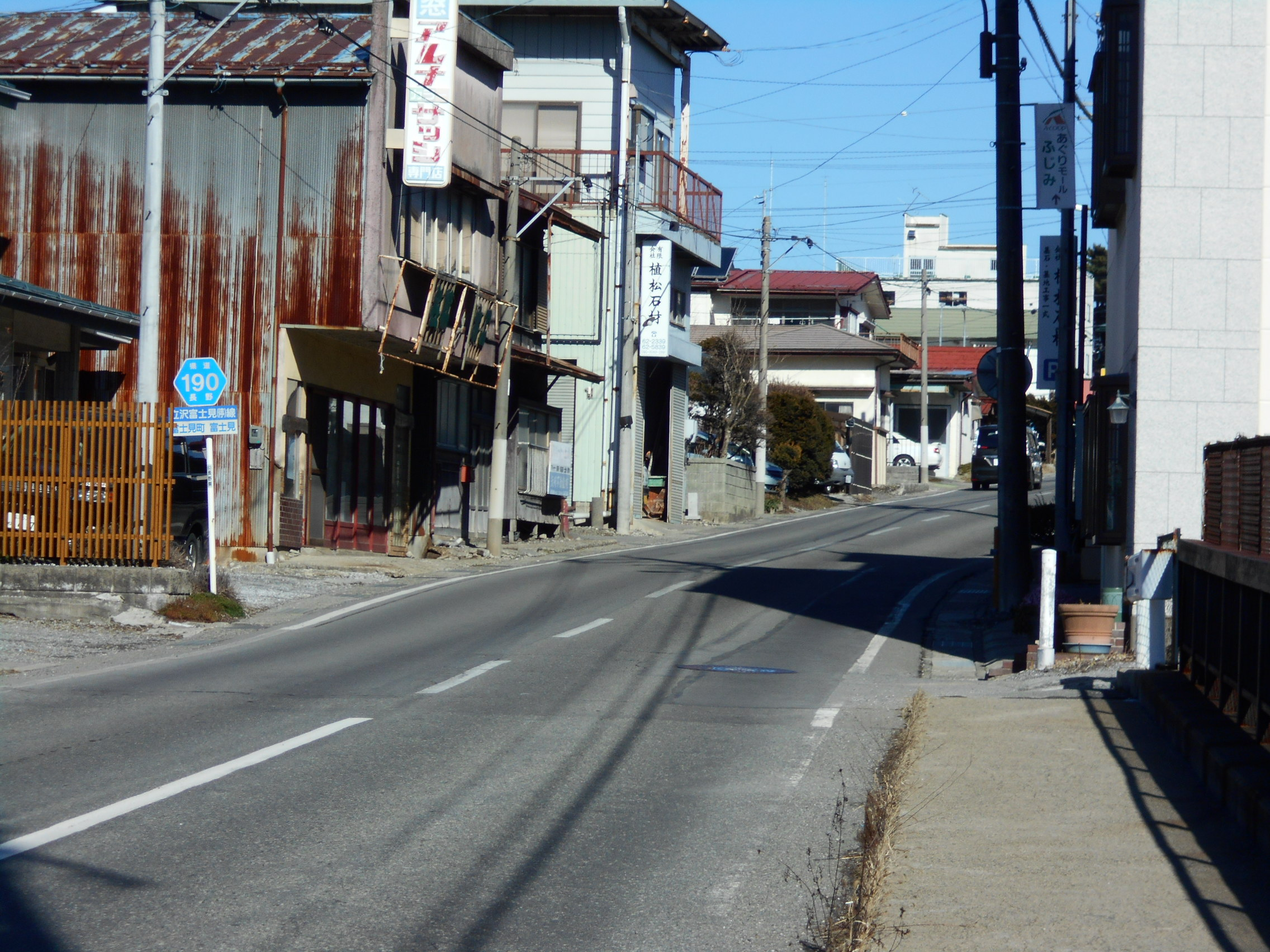 長野県道190号立沢富士見停車場線 長野県富士見町富士見